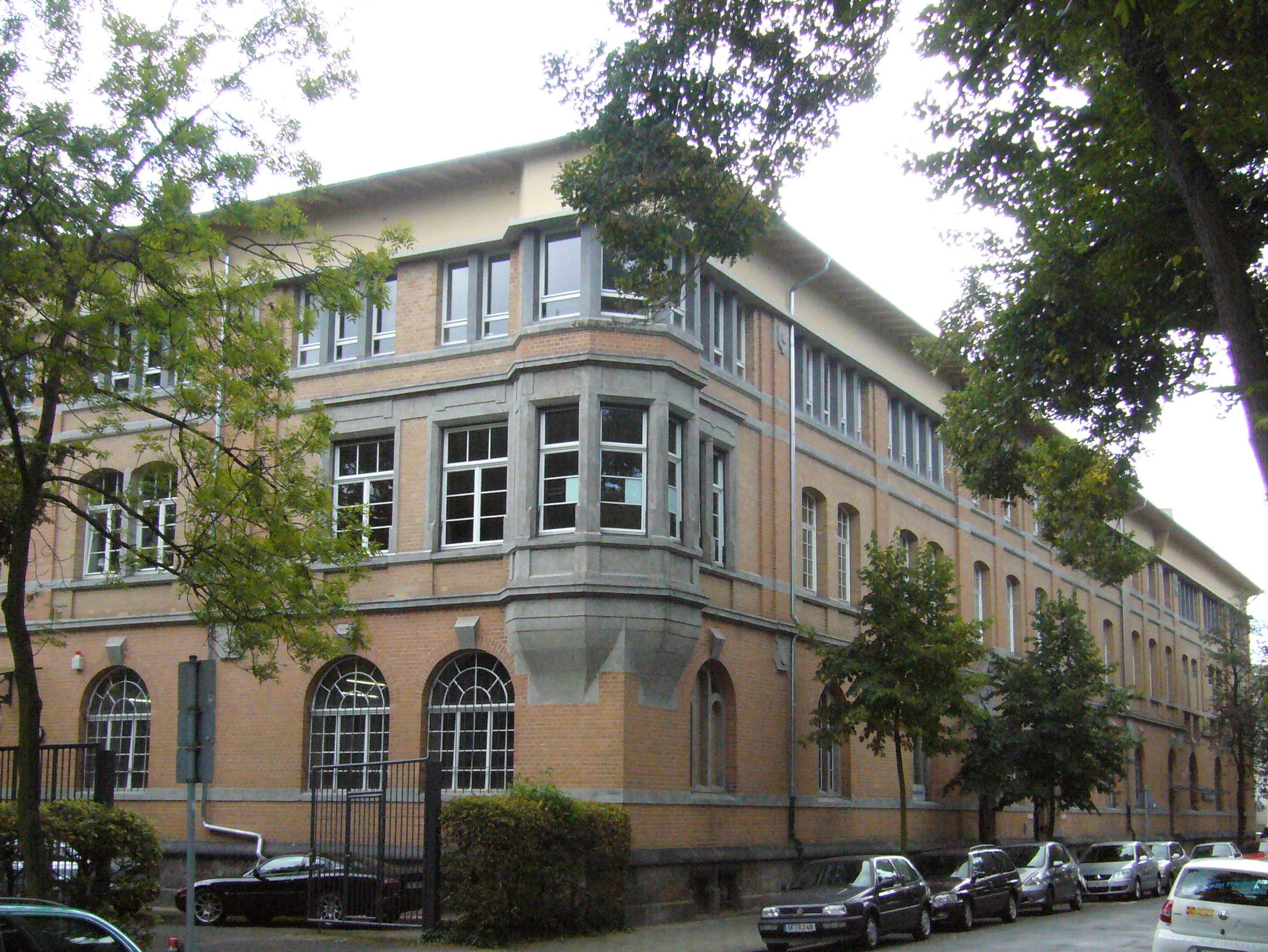 Der Bernardbau, Sitz des Hauses der Stadtgeschichte mit Museum und Archiv; Herrnstraße 61